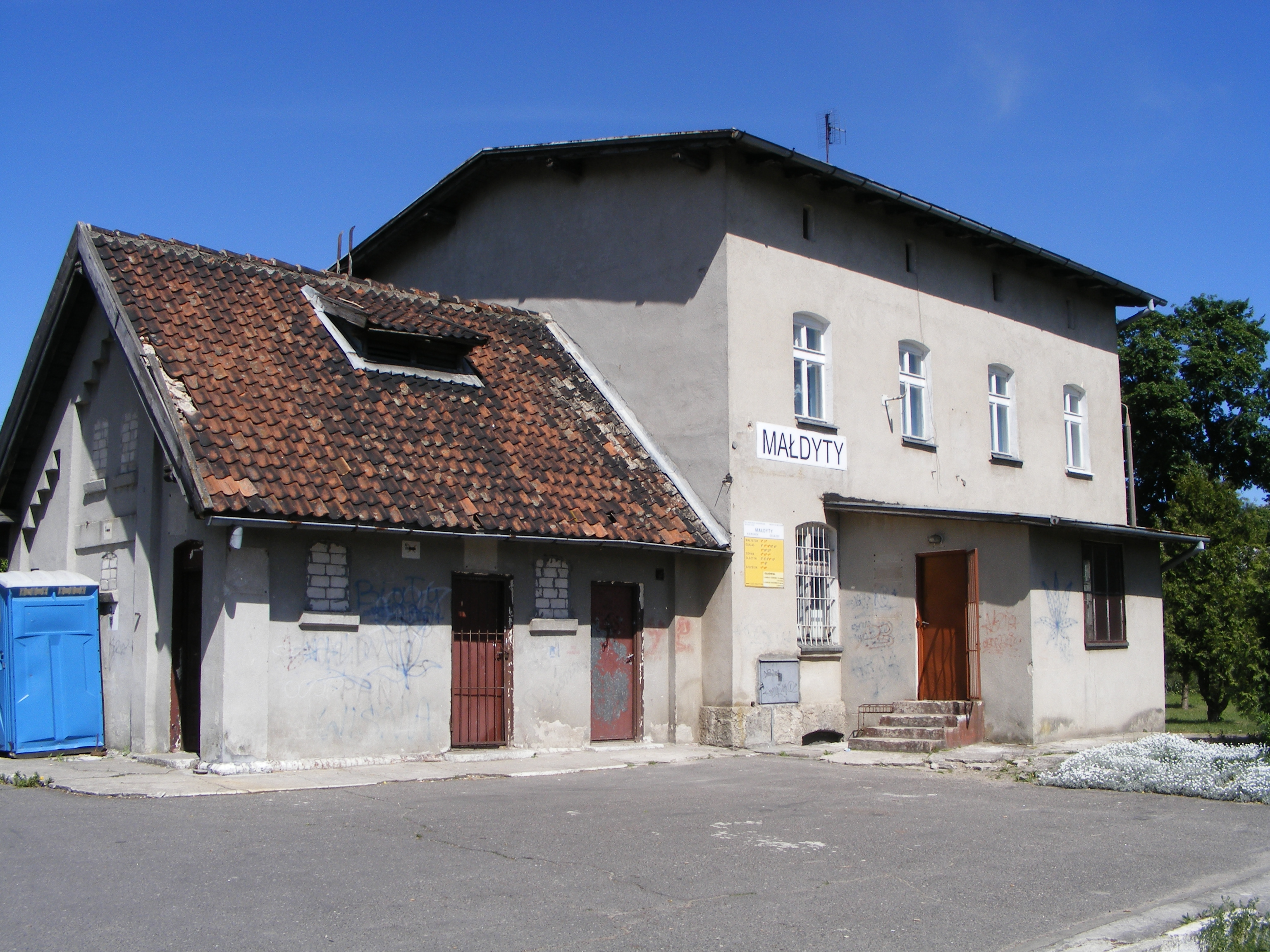 PKP. BUDYNEK STACYJNY.